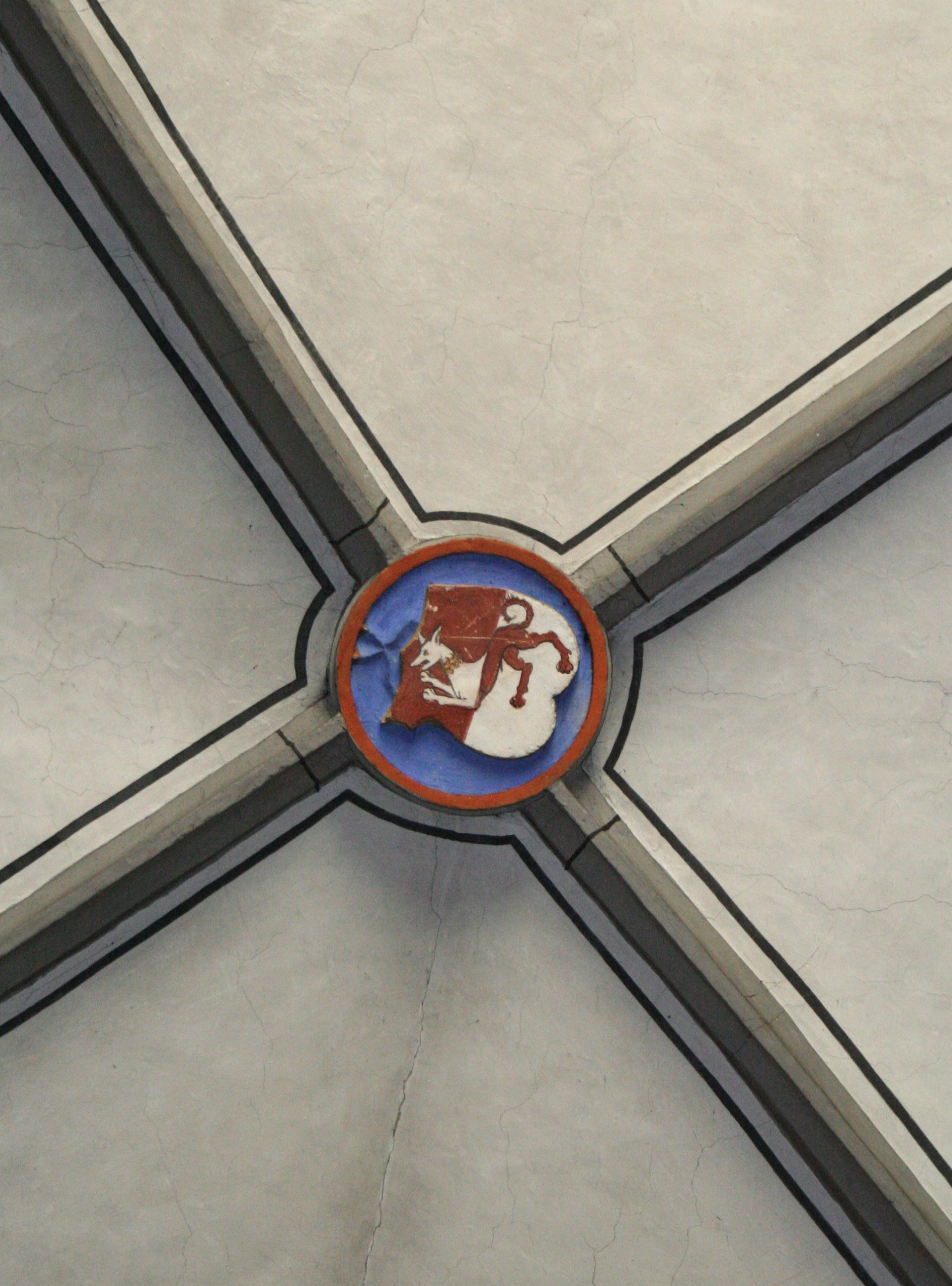 Kirche St. Maria und Michael in Churwalden, Schlussstein